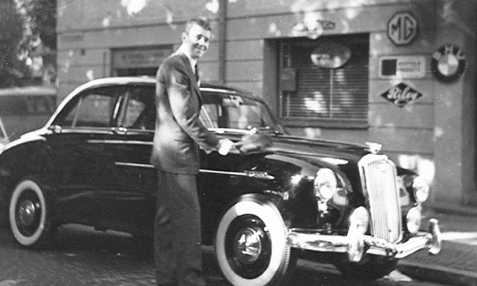 Ingemar Hedin, bilhandlare